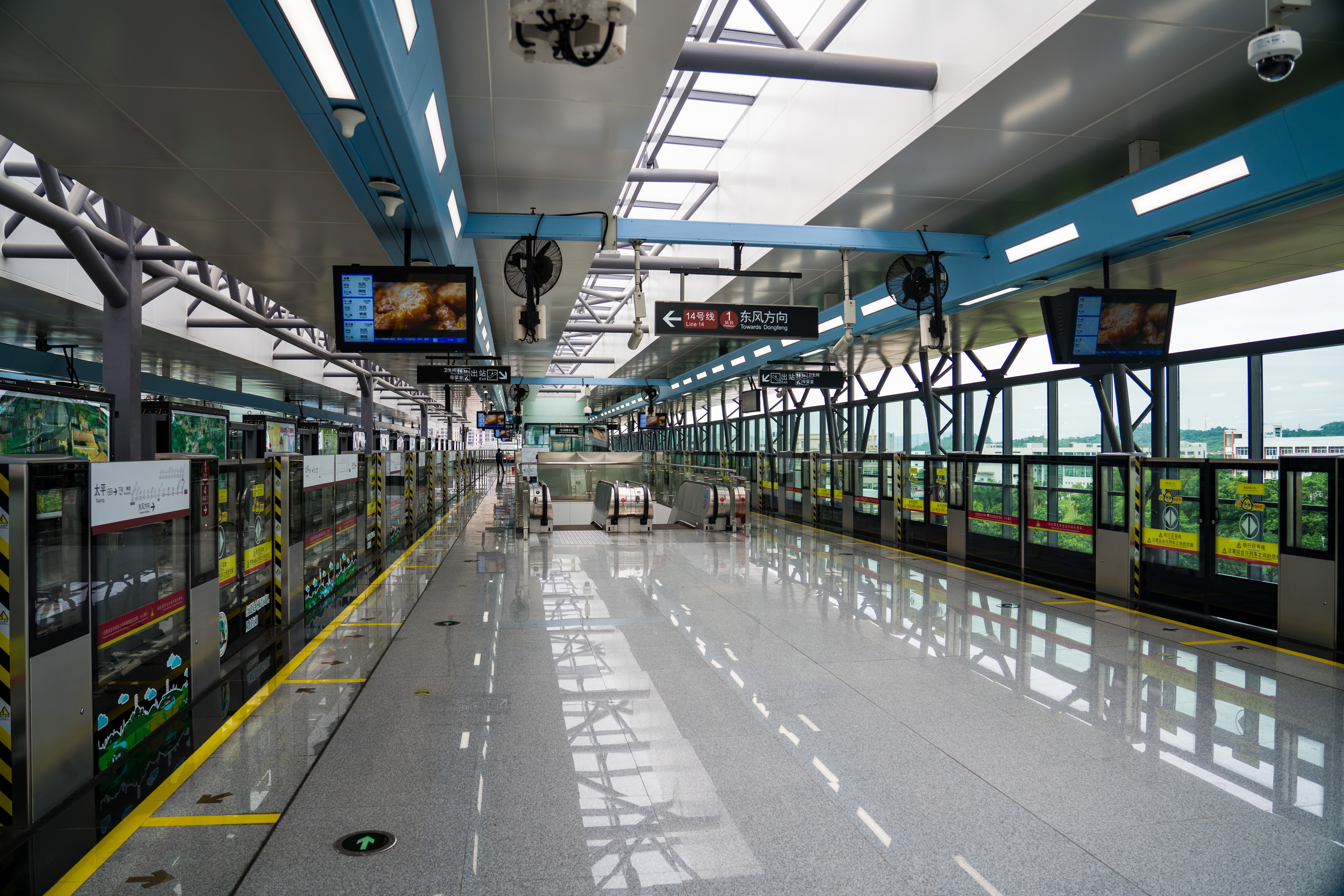 广州地铁太平站1号月台